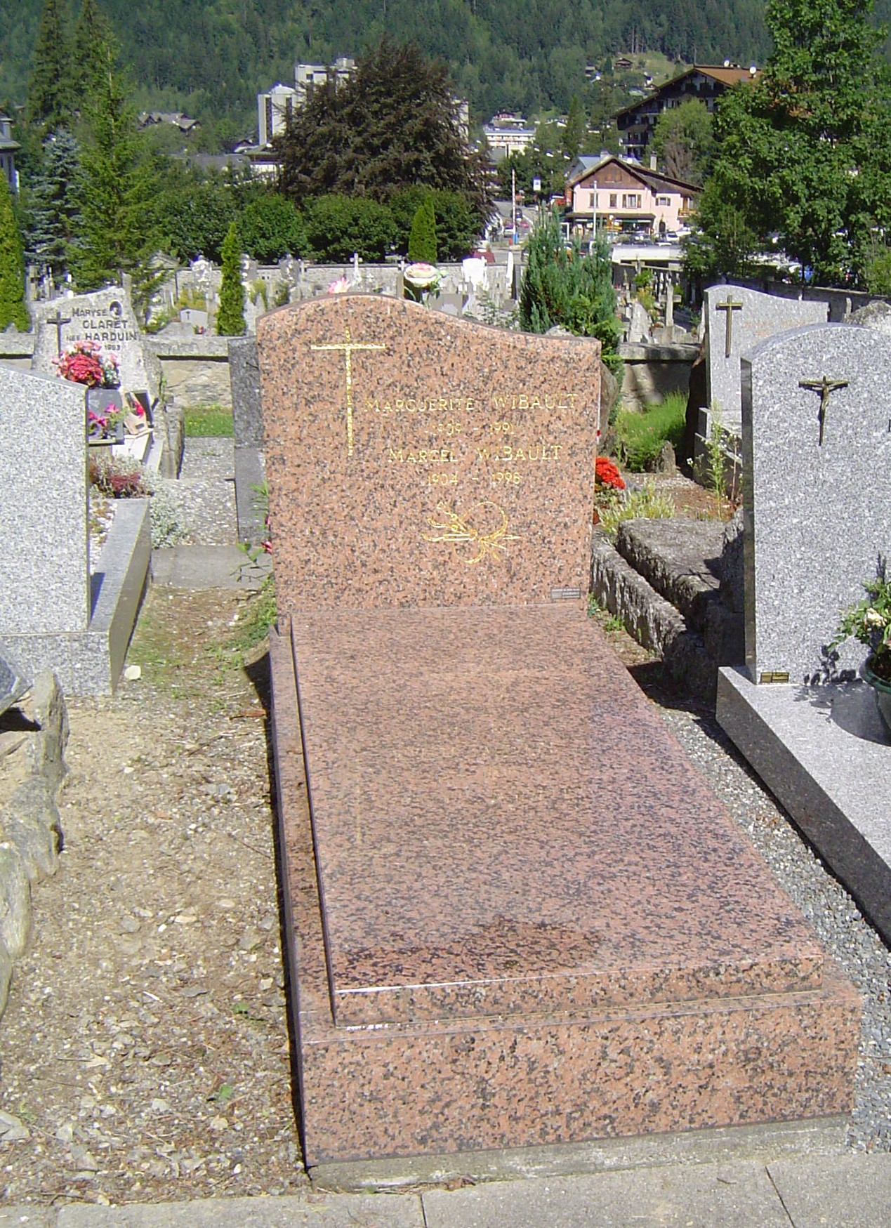 Photo prise au cimetière de Chamonix-Mont-Blanc (France)